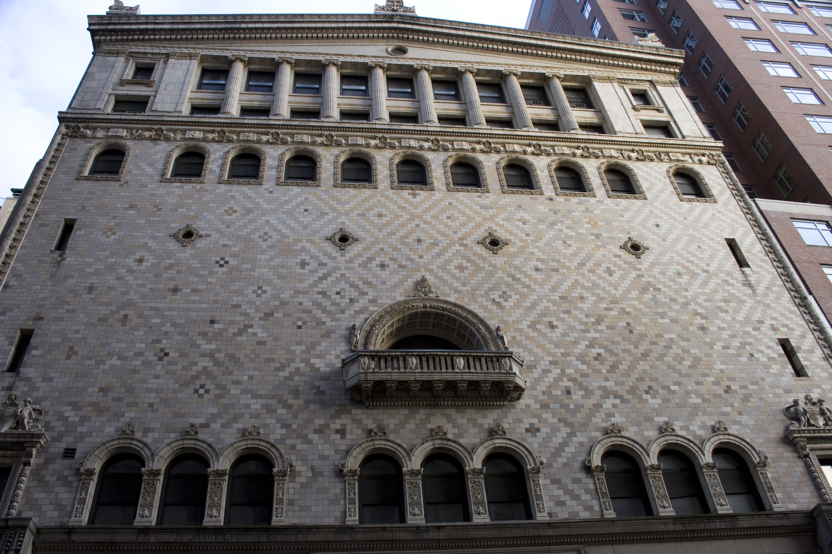 Tremont temple upper view